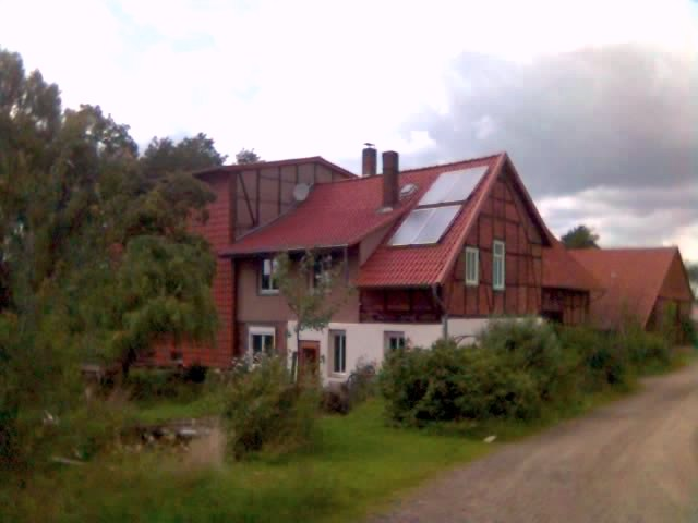 Eine Fotographie der Lindauer Mordmühle.